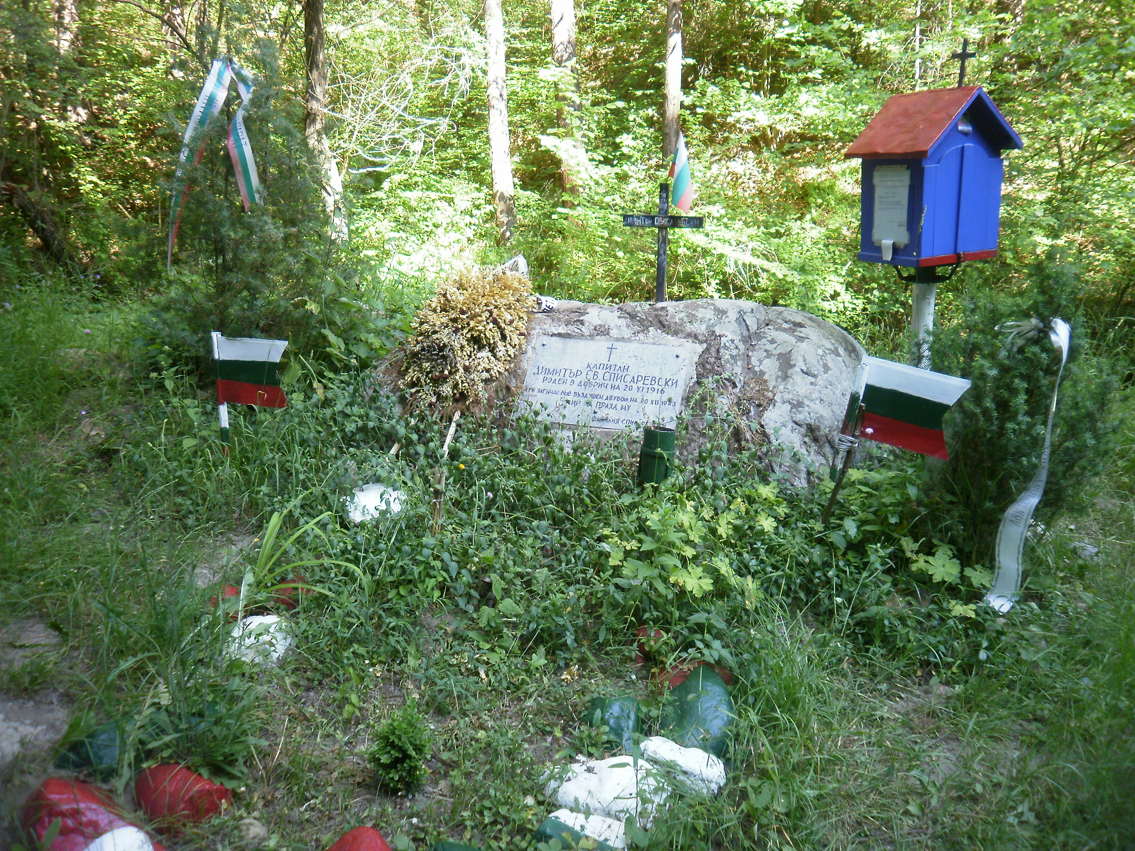 Лобното място на Димитър Списаревски в Долни Пасарел.